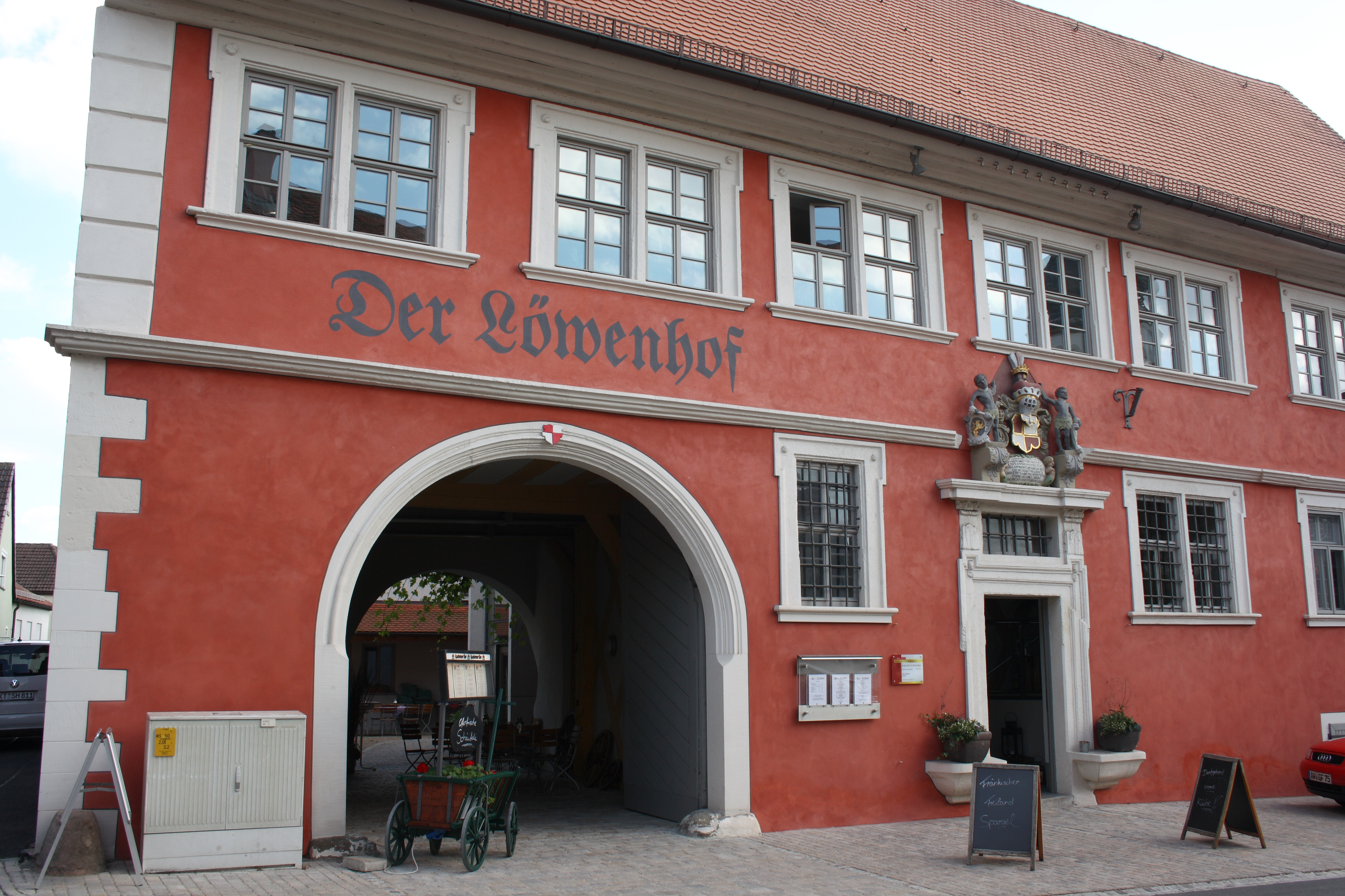 ehemaliges Gasthaus Zum Goldenen Löwen in Rödelsee im Landkreis Kitzingen (Bayern)